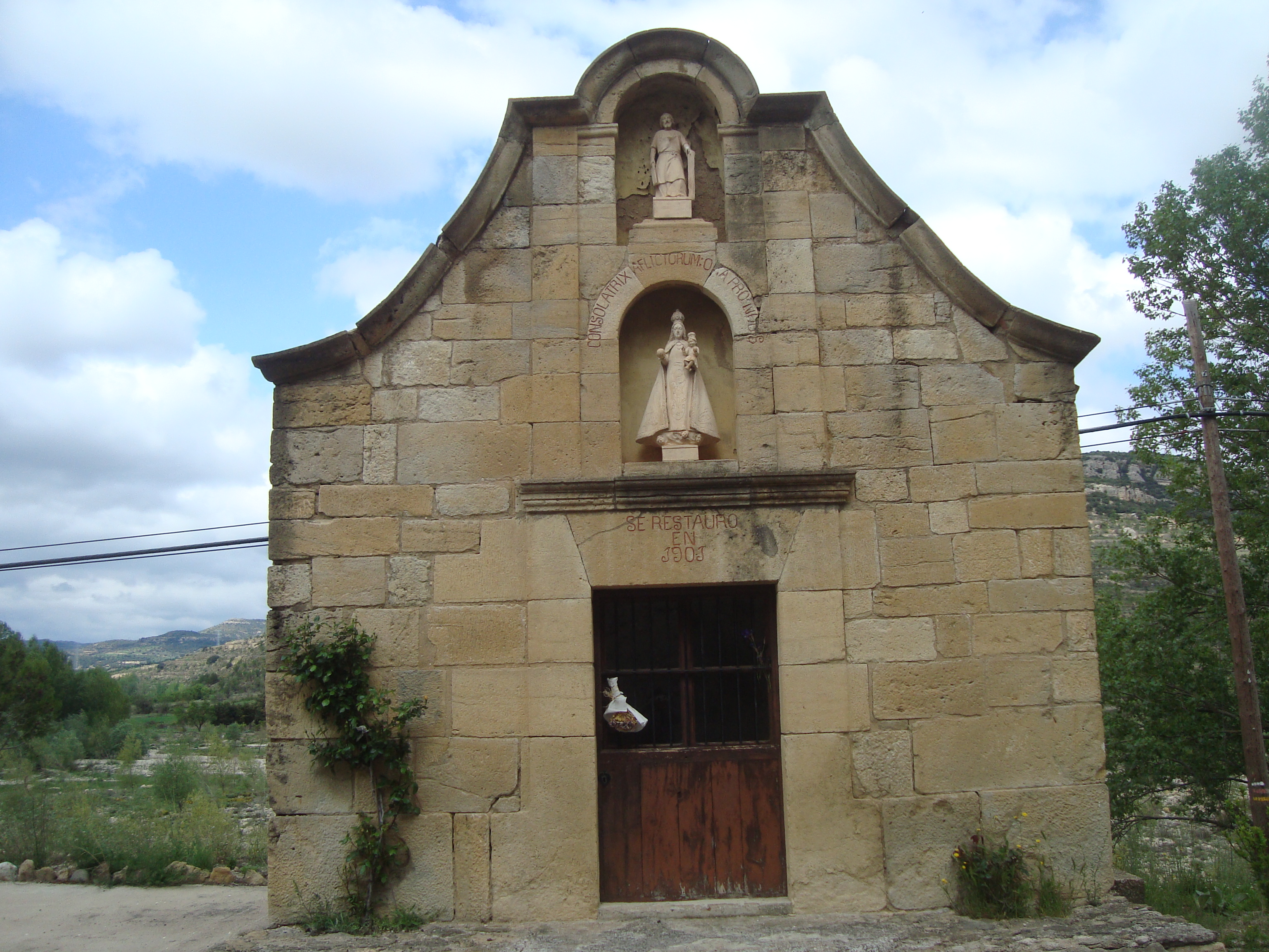 Ermita de la Consolacioneta (Forcall) 01.061-019.